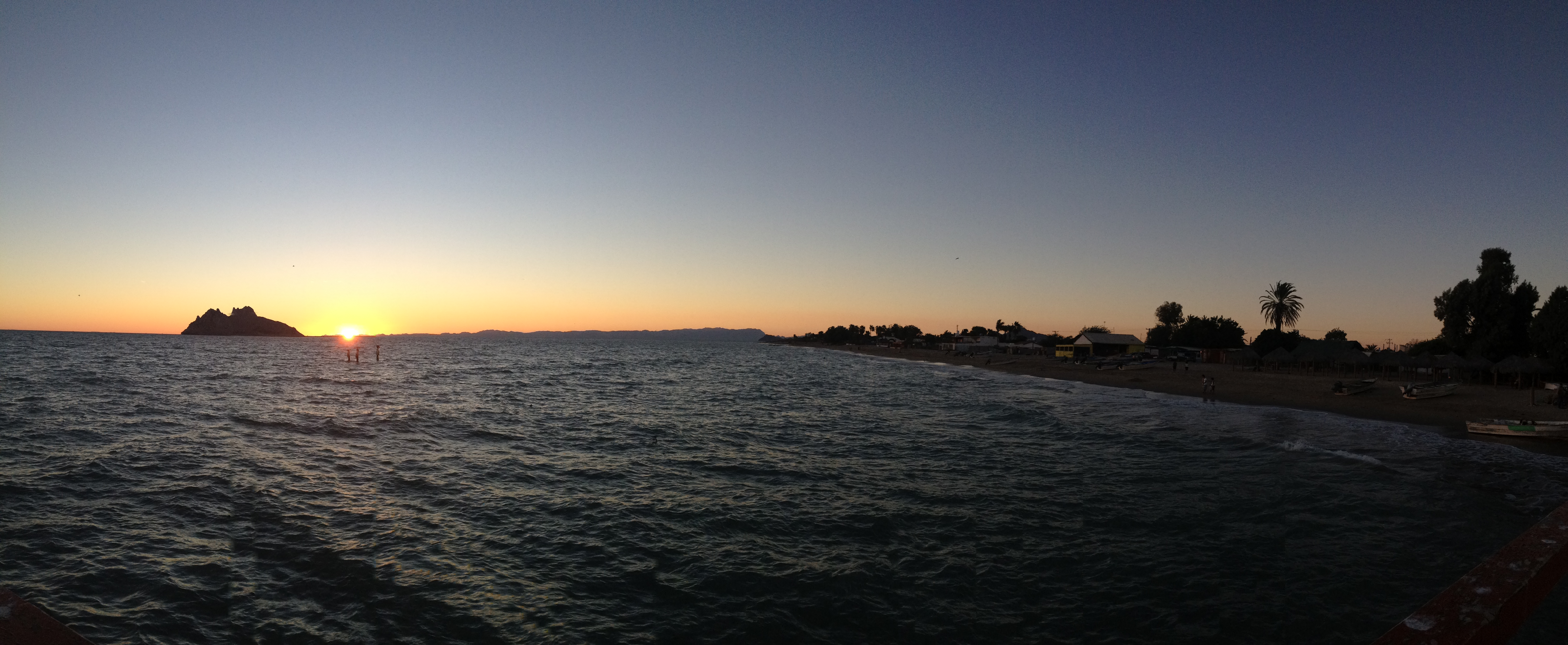 Vista panorámica desde el muelle de Bahía de Kino, Sonora, México.